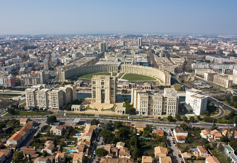 Montpellier, vue sur Antigone, Photo prise par ballon captif par Paul-Louis FERRANDEZ de la société MEROPS-Photo